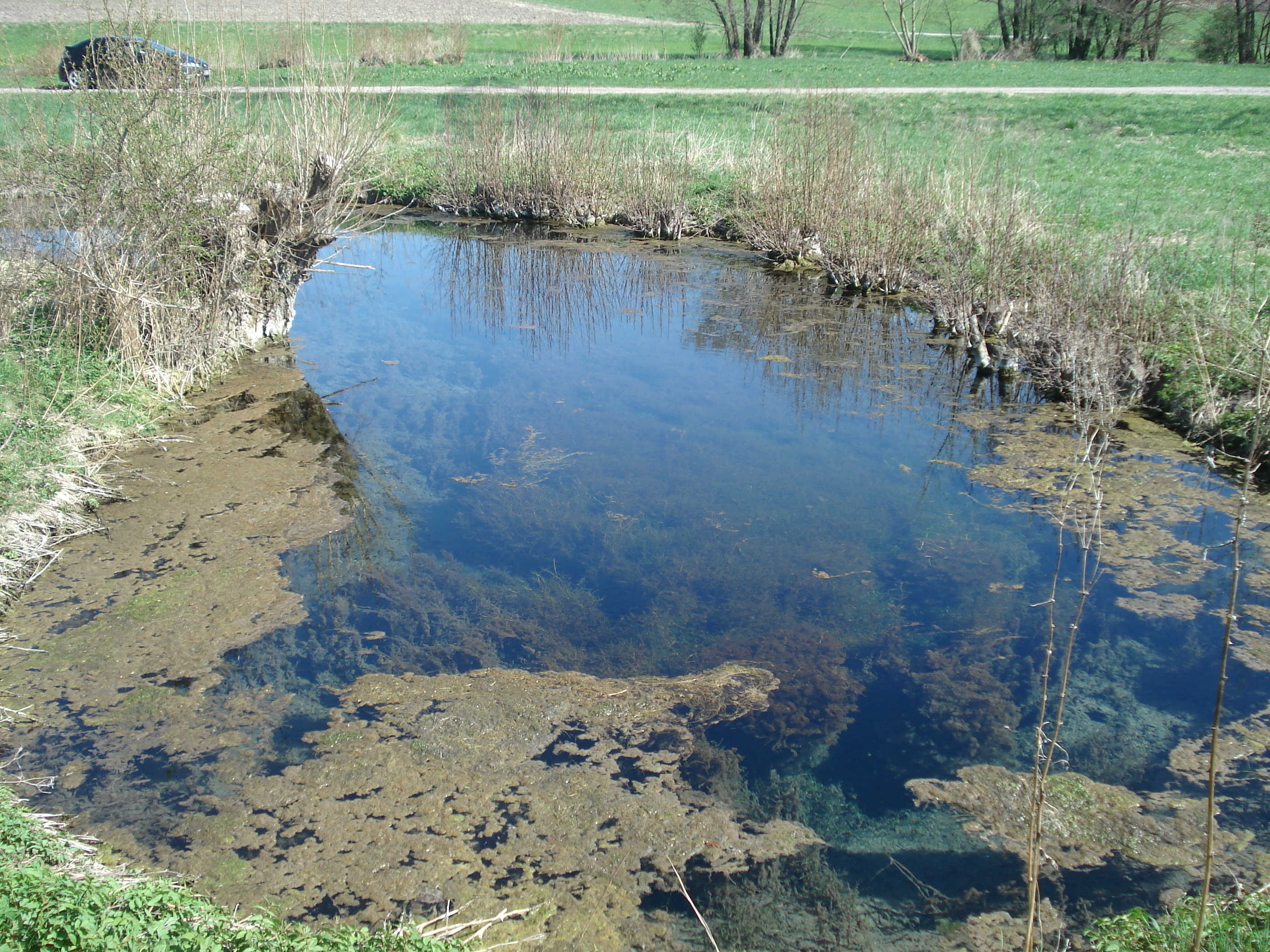 Der Walsbrunnen bei Sontheim